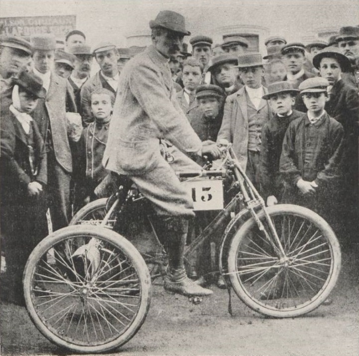 Fernand Charron deuxième du Critérium des Motocycles en 1897 - Le Sport Universel Illustré du 24 avril 1897, p.157